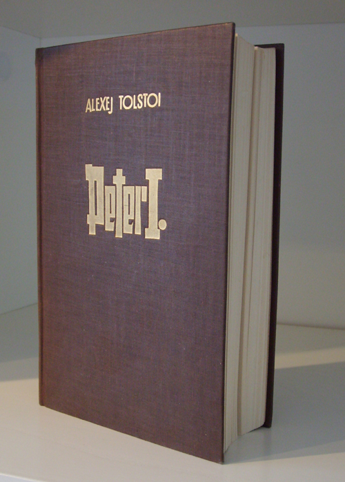 Alexej Tolstoi: Peter I., 1950 Aufbau-Verlag Berlin